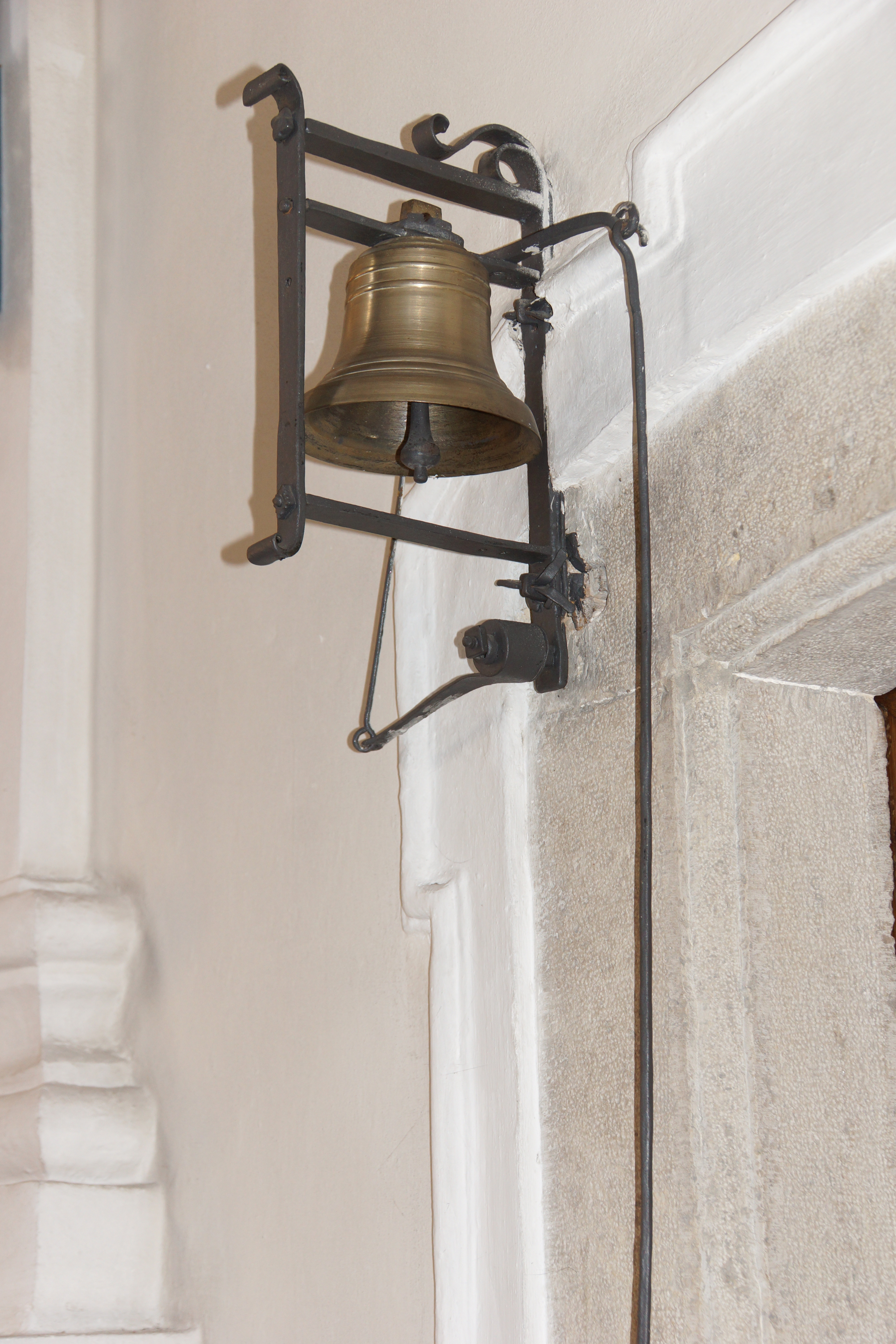 Die katholische Pfarrkirche St. Jakobus in Greding